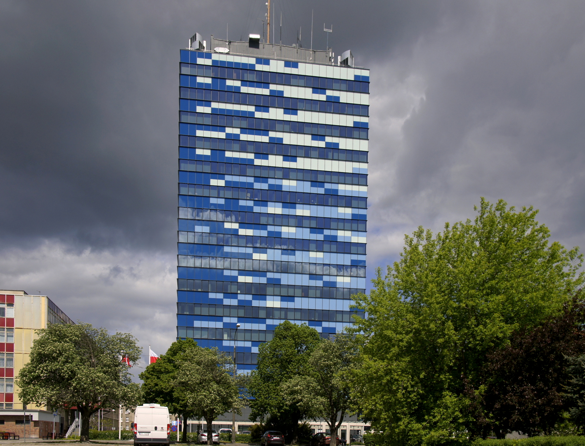 Gorzów Wlkp., ul. Jagiellończyka 8. Budynek Lubuskiego Urzędu Wojewódzkiego po przebudowie